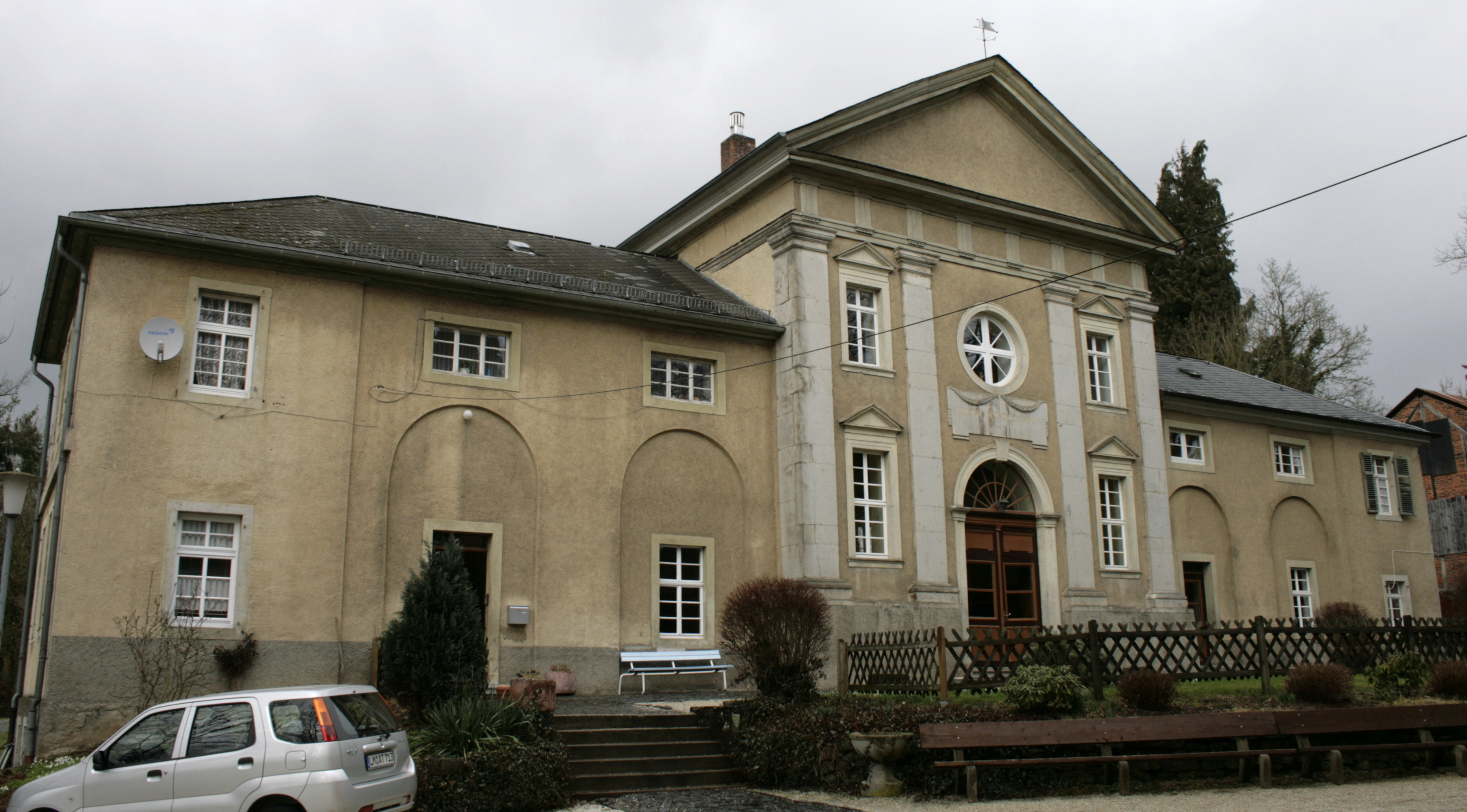 Ehemaliger Marstall der Burg Waldmannshausen in Elbgrund, Deutschland